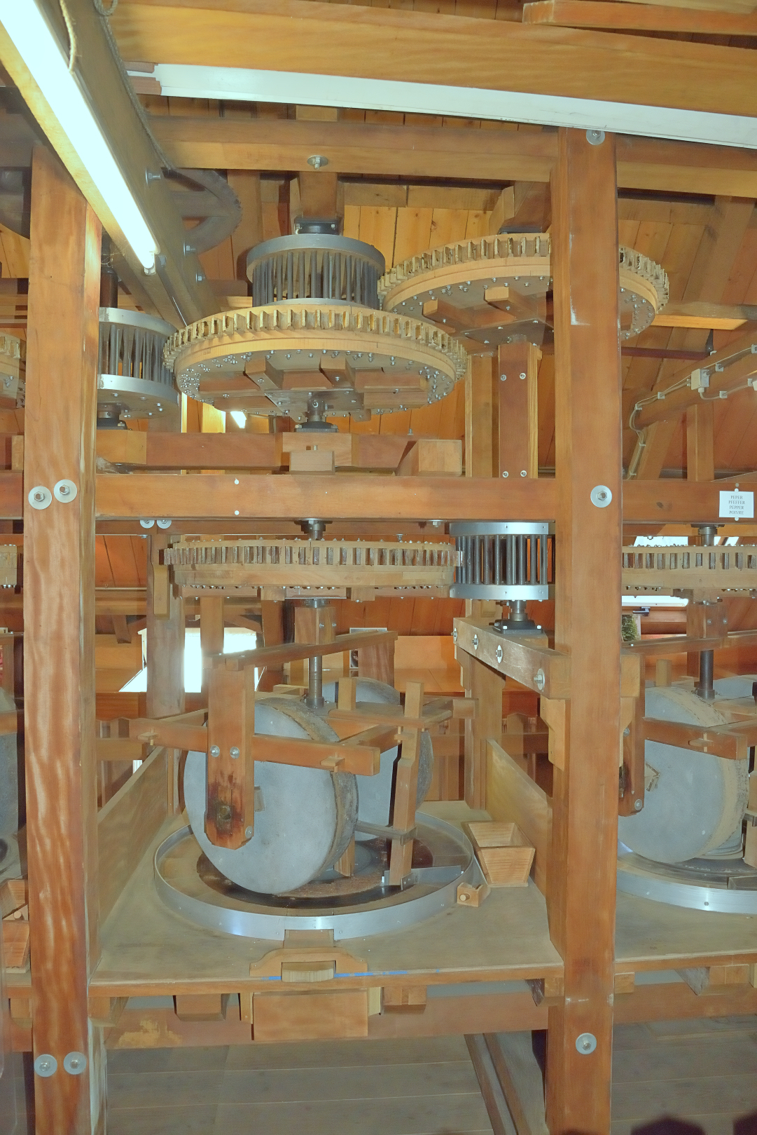 De Wachter, Zuidlaren specerijenmolen